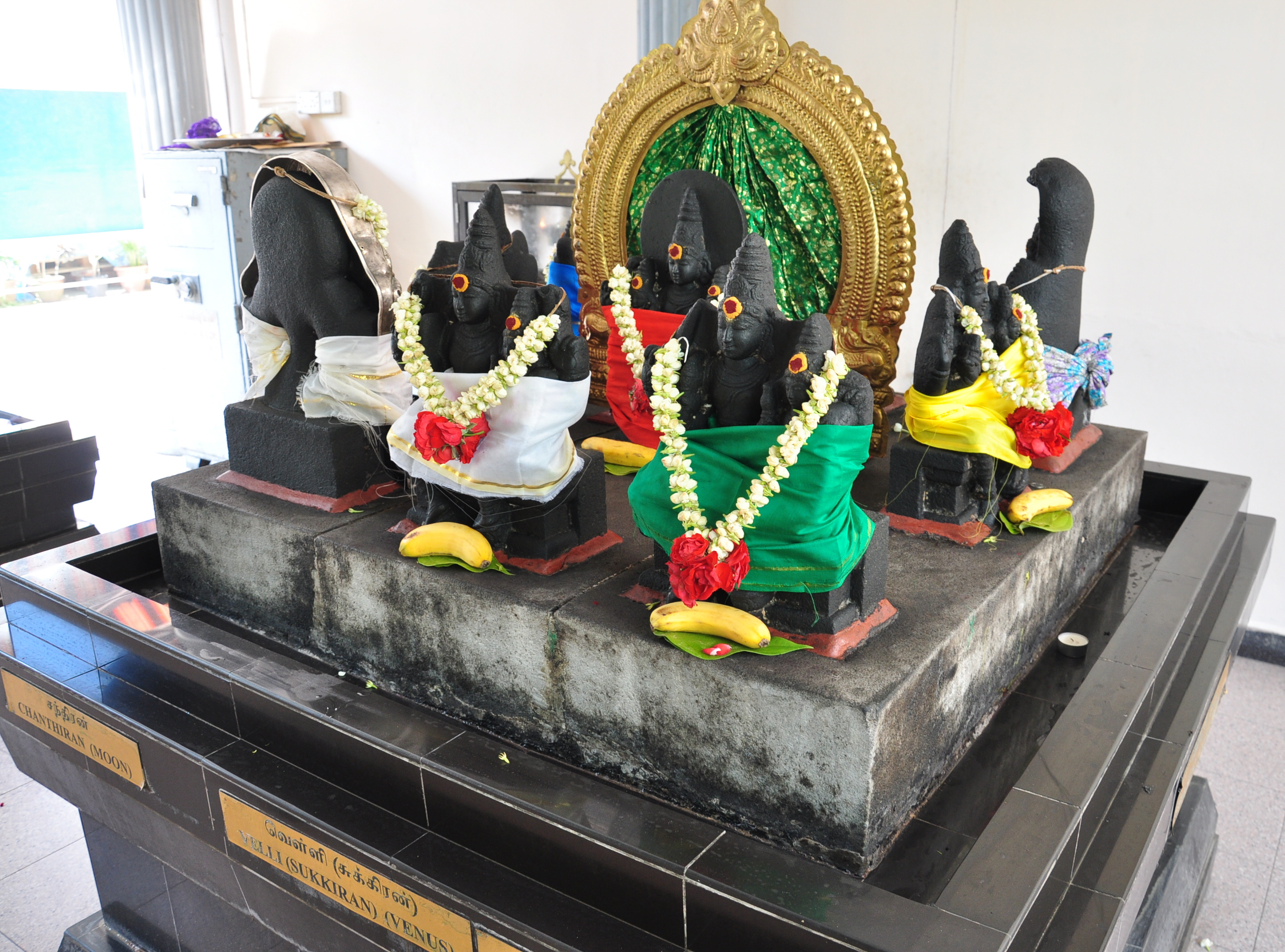 Navagraha deities in Ruthra Kaliamman Temple, Singapore